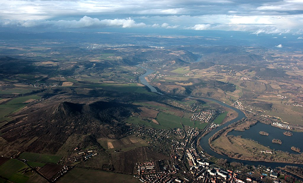 Labe u Lovosic od JJZ. Vlevo Lovoš, kopec sopečného původu, u pravého dolního okraje část Lovosic, nad nimi na levém břehu Labe Lhotka nad Labem a dále Malé Žernoseky, naproti nim na pravém břehu Velké Žernoseky a vodní plocha Žernoseckého jezera.